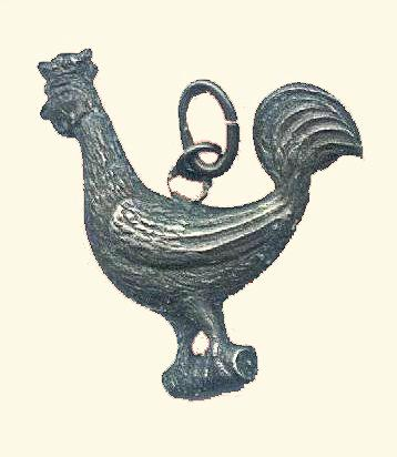 Odznaka Lwowskiego Towarzystwa Strzeleckiego